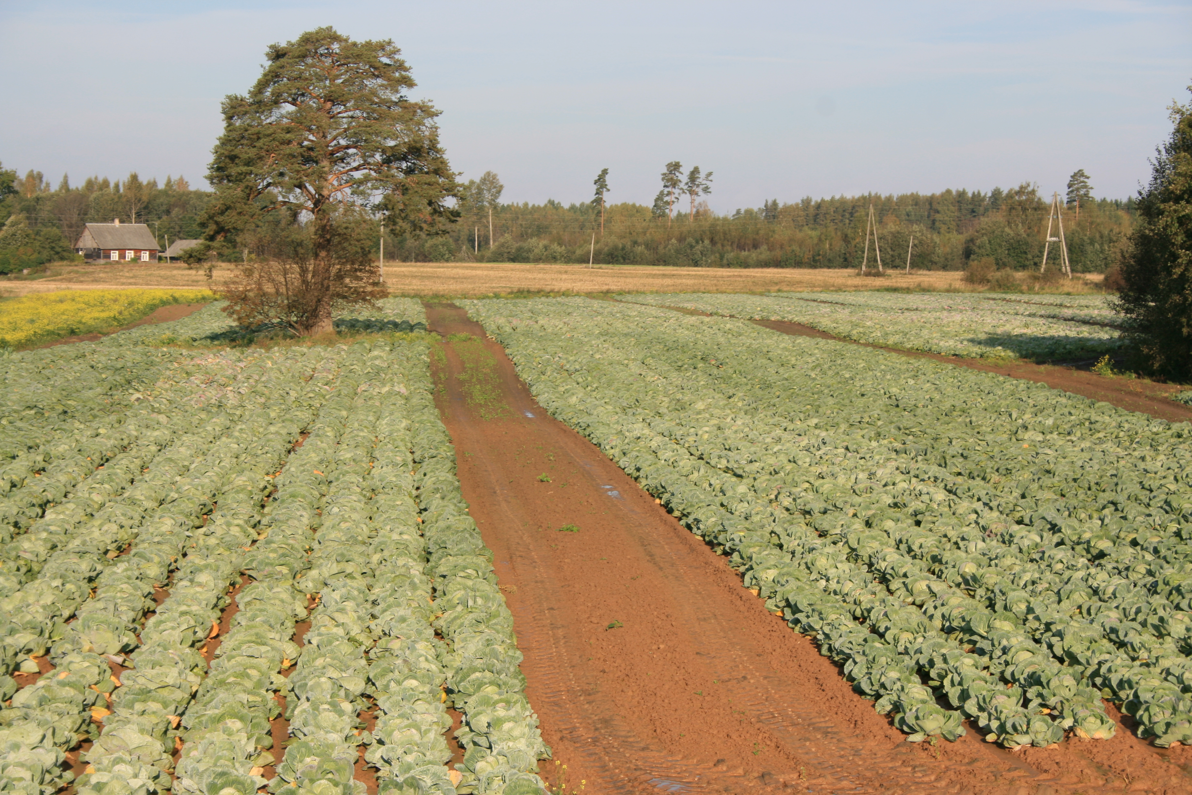 Dimdiņ kāposti.Cabbages